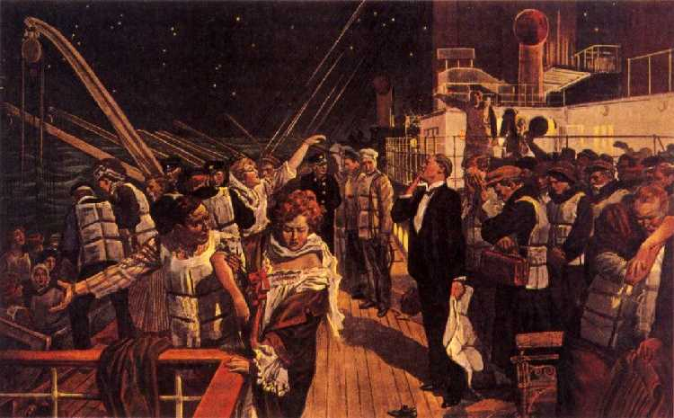 1912年に作成された壁面画 タイタニック号沈没事件について描かれている